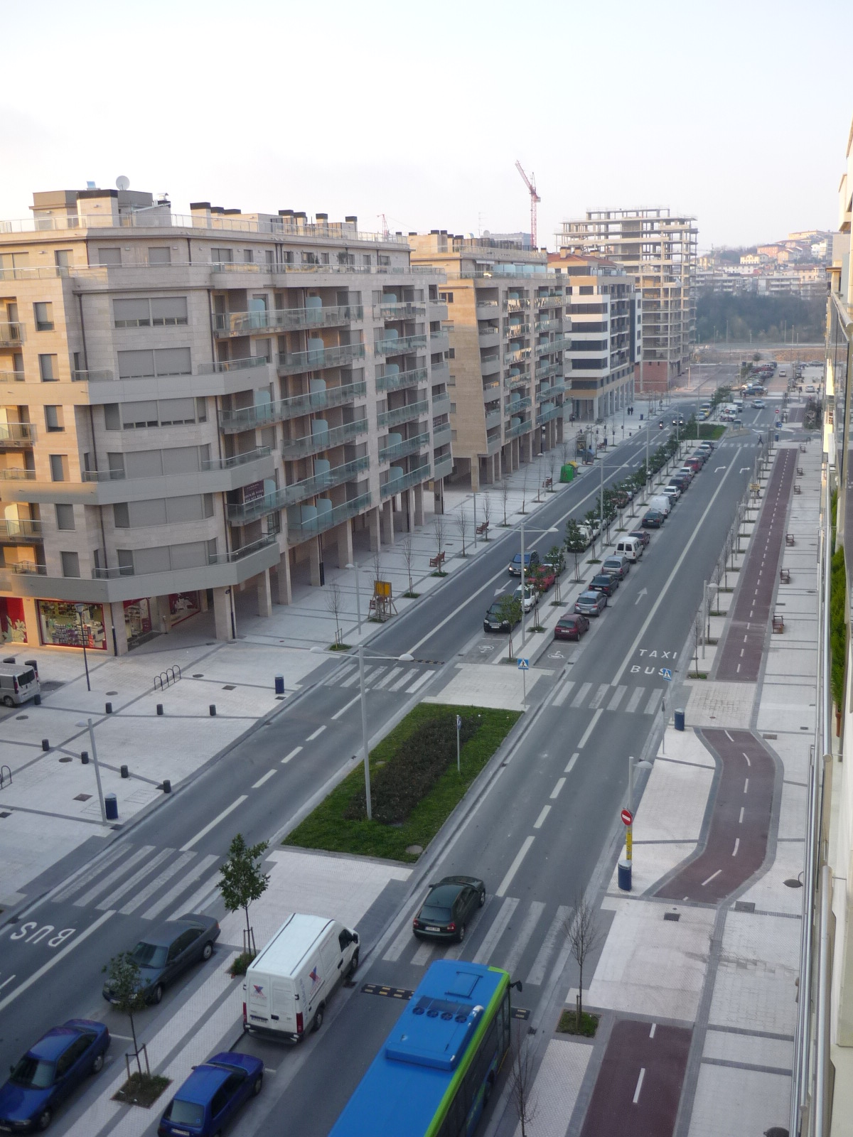 Avda Barcelona